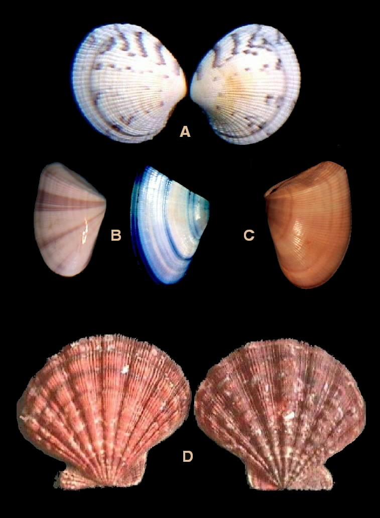 Fotos de Moluscos del estado Falcón - Venezuela A. Codakia orbicularis B. Donax denticulatus C. Donax striatus D. Lyropecten nodosus